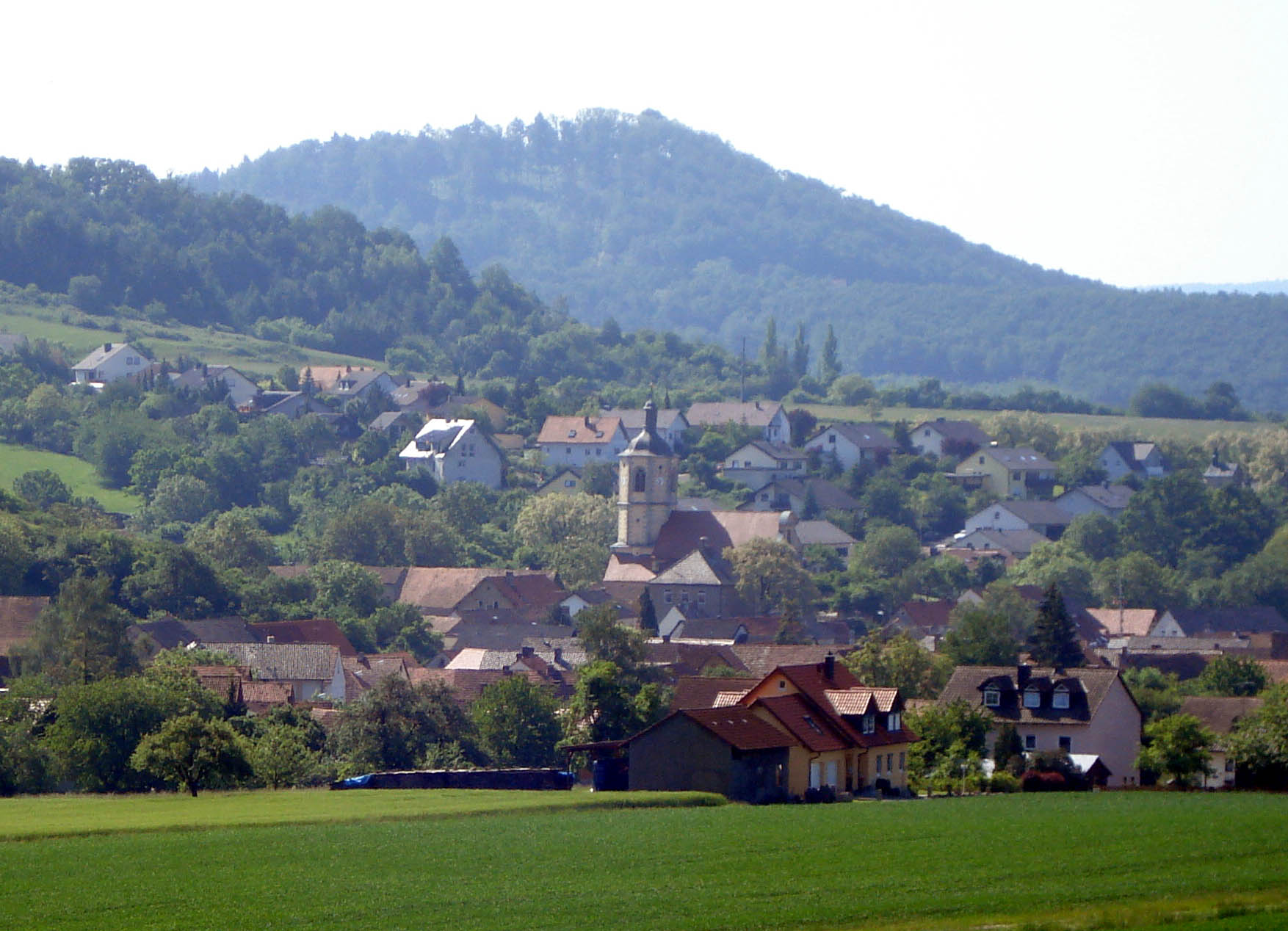 Blick auf Prappach, Stadt Haßfurt, Unterfranken